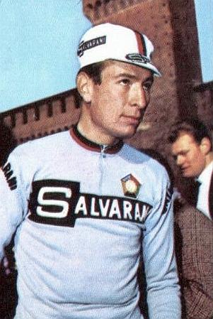 Felice Gimondi en 1969 - Campioni dello Sport 1969-1970, n°185